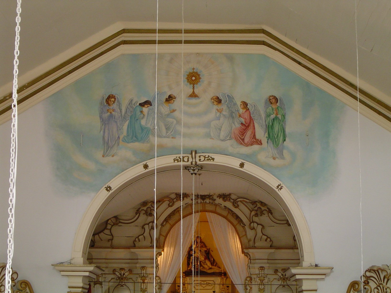 Santuário Nossa Senhora da Piedade, Barbacena-MG